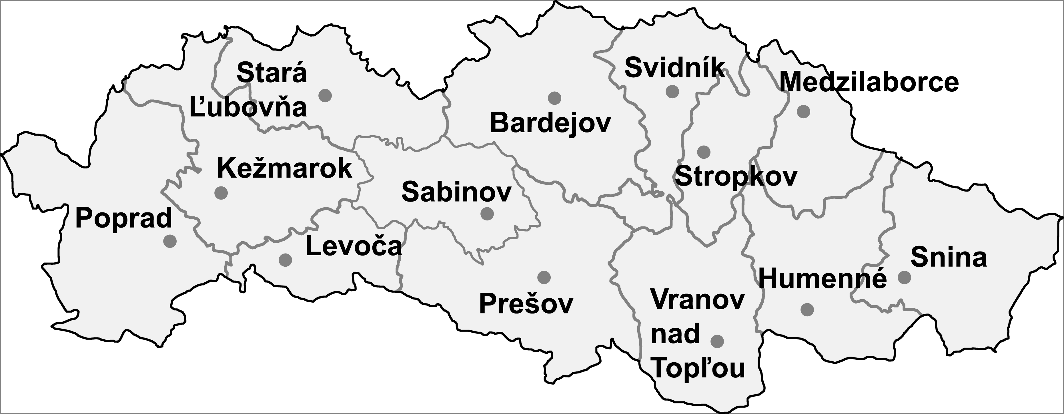 Prešov region (kraj) with districts (okresy)